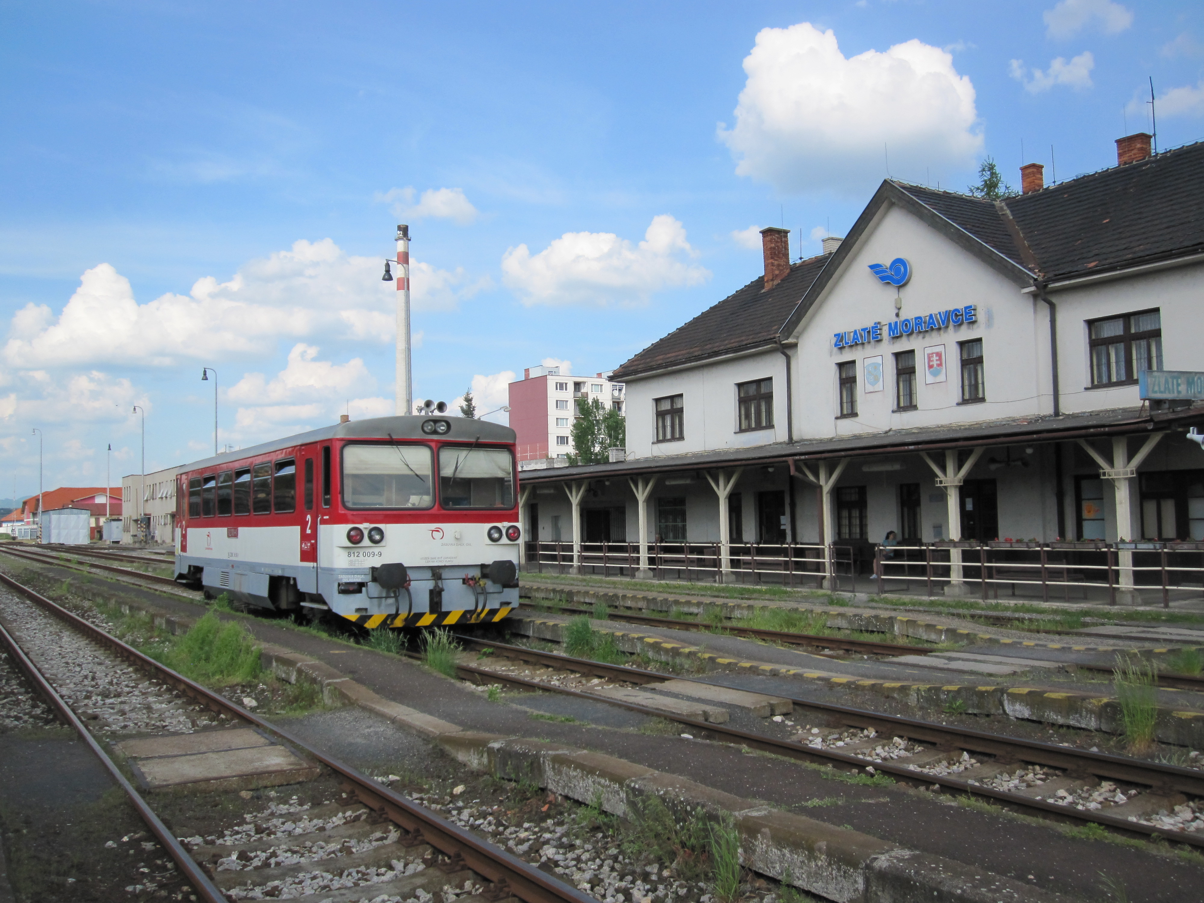 Motorový vůz 812.009 Železniční společnosti Slovensko, Zlaté Moravce